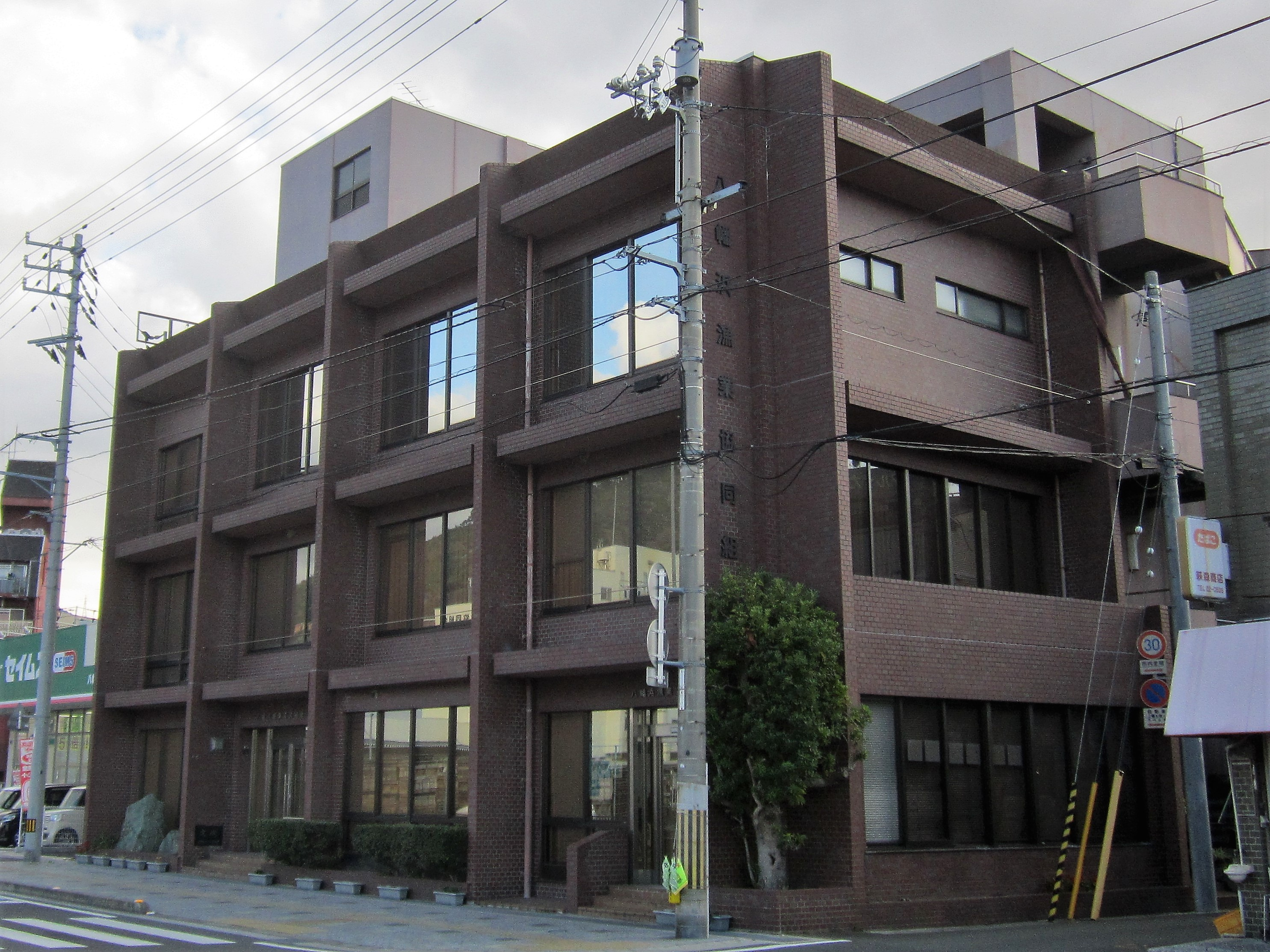 八幡浜漁業協同組合（八幡浜市大黒町）